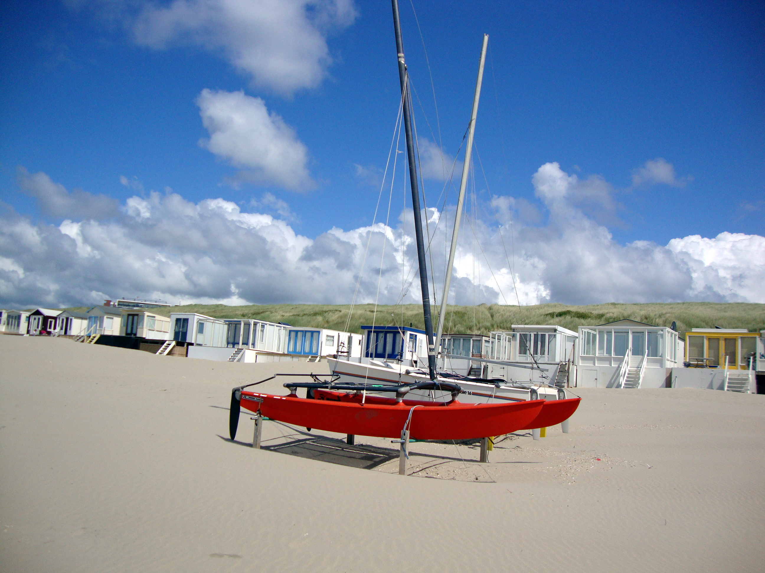 Wijk aan Zee, Netherlands. Beach.